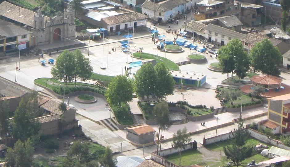 Vista panoràmica de la actual Plaza Mayor del distrito de Yauli - Huancavelica